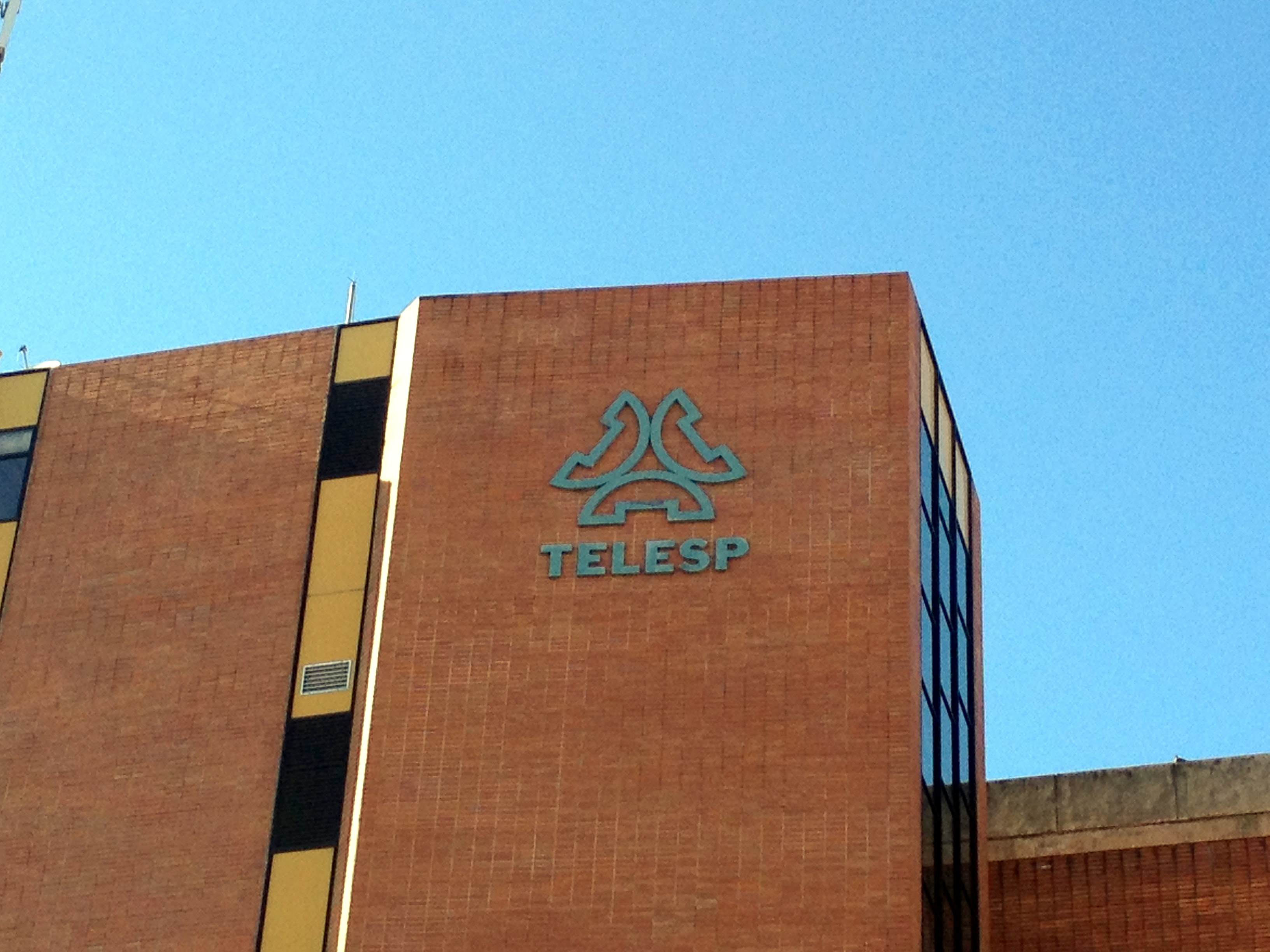 Prédio da antiga TELESP em Campinas, SP.